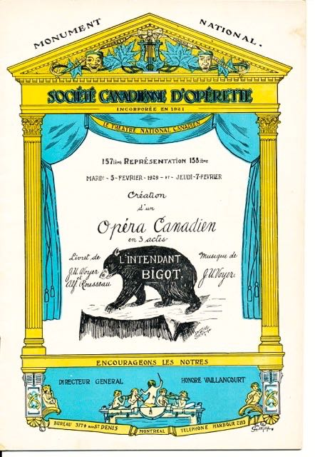 Programme de la présentation de l'opéra L'Intendant Bigot au Monument national de Montréal les 5 et 7 février 1929